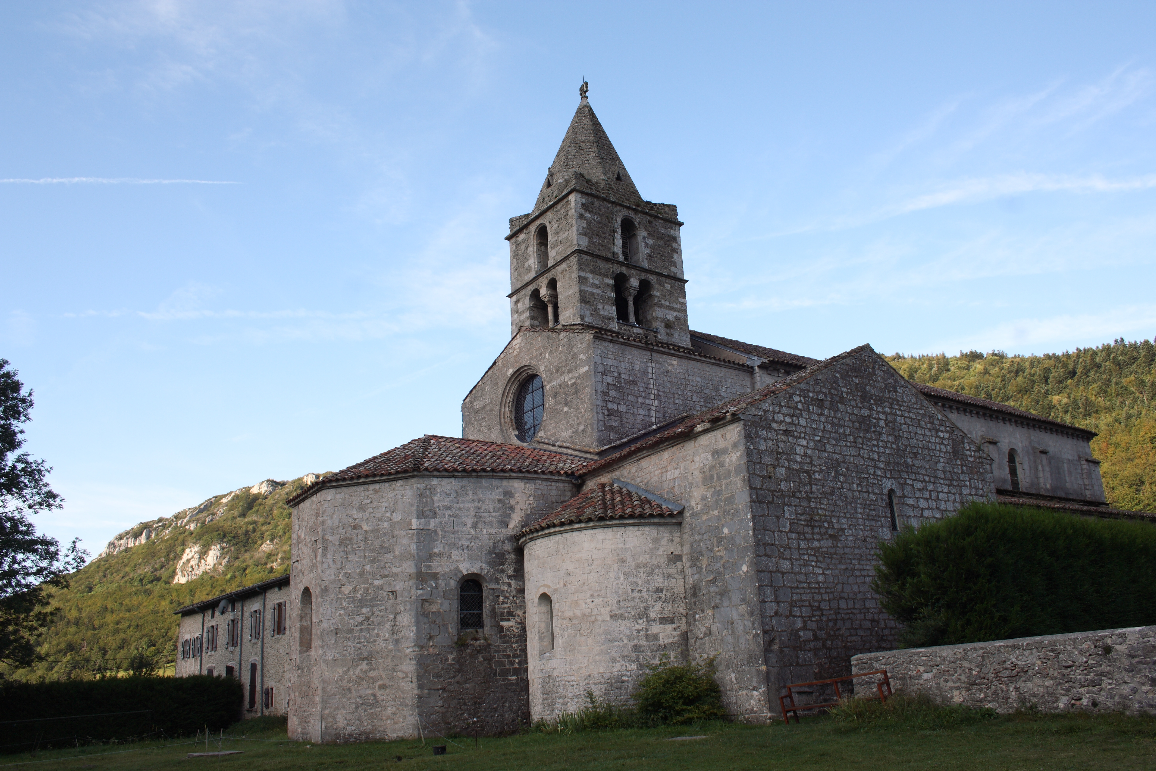 Abtei Sainte-Marie in Léoncel